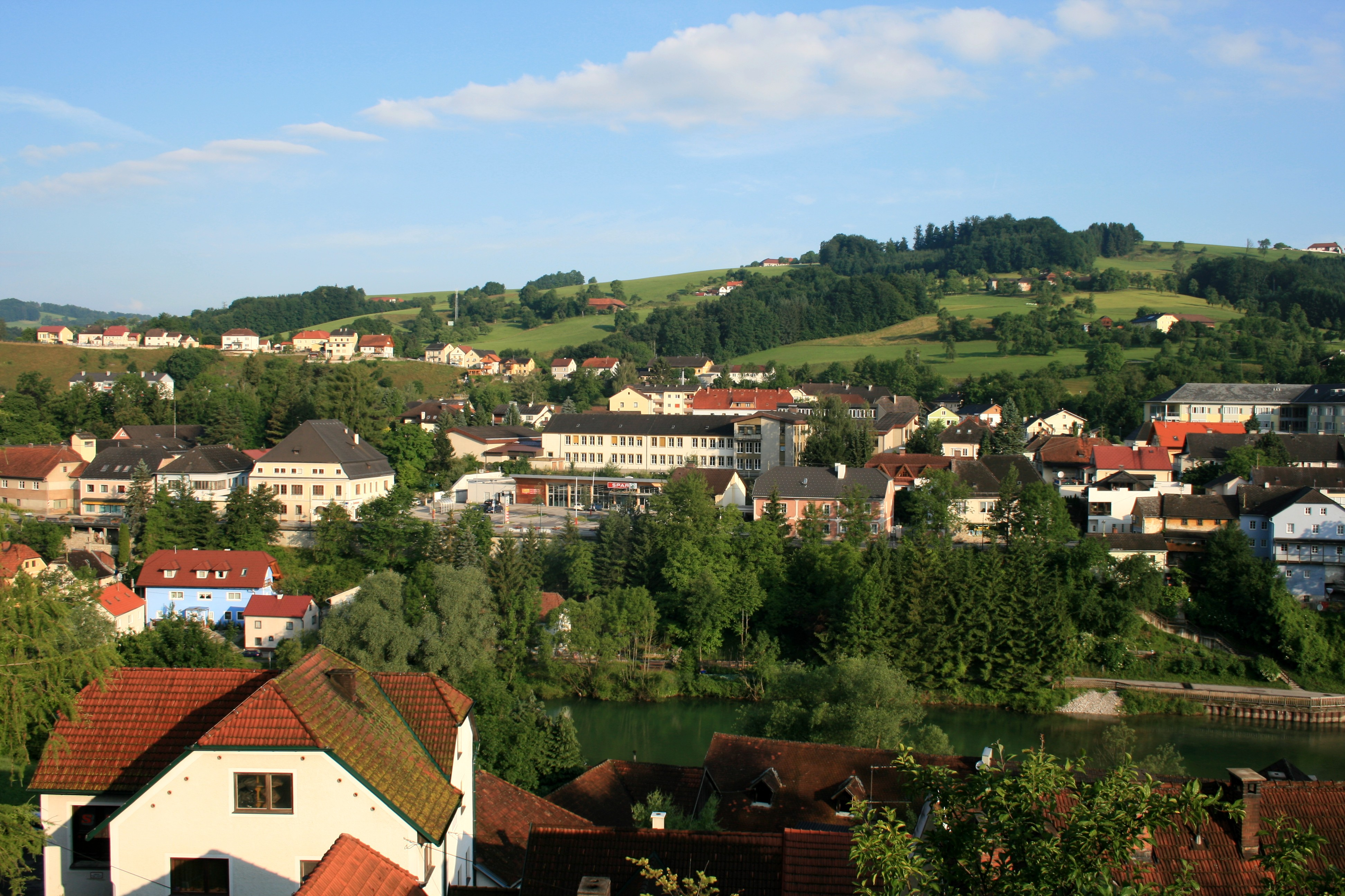 Die Gemeinde Grünburg in Oberösterreich vom Nachbarort Steinbach aus gesehen. Der Fluss zwischen den beiden Gemeinden ist die Steyr. Das große Gebäude in der Bildmitte ist die Hauptschule Grünburg und direkt links neben dem Supermarkt befindet sich das Sparkassengebäude.